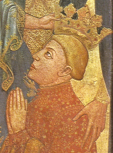 El rei Ferran d'Antequera és coronat pel Nen Jesús, detall del retaule de l'arquebisbe de Toledo Sancho de Rojas, procedent de San Benito el Real Valladolid